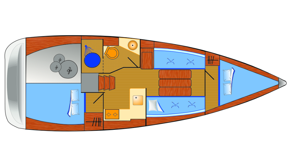 Raumaufteilung der 2-Kabinen-Version der Sun Odyssey 349